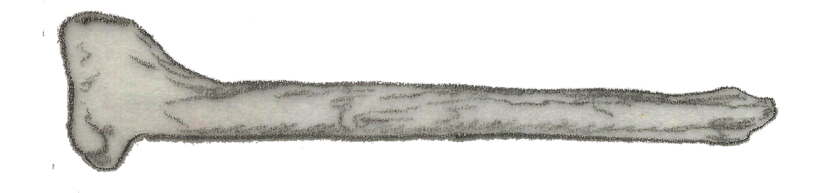 Illustration of a fossil of Coelosaurus